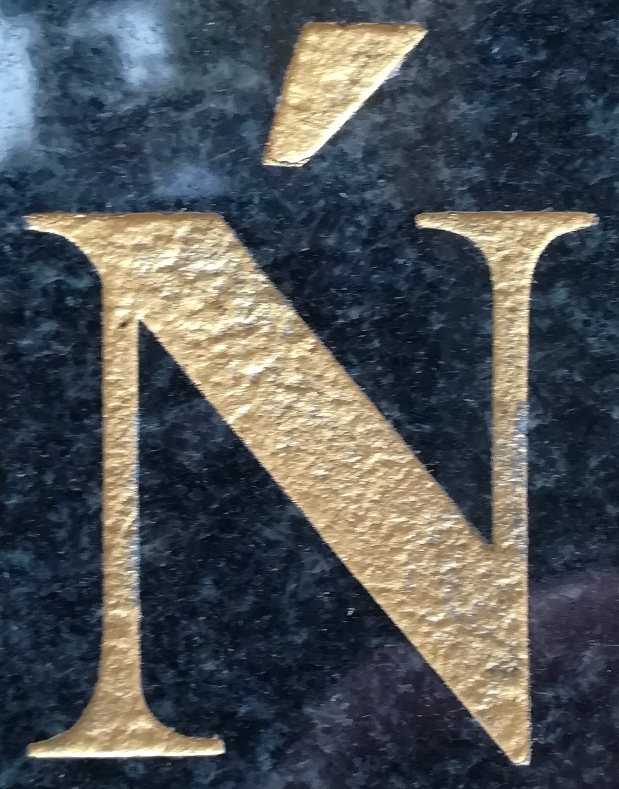 Litera Ń.